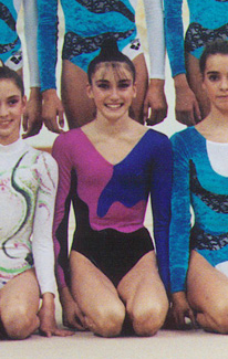 Noelia Fernández en el Gimnasio Moscardó (Madrid) en 1991.